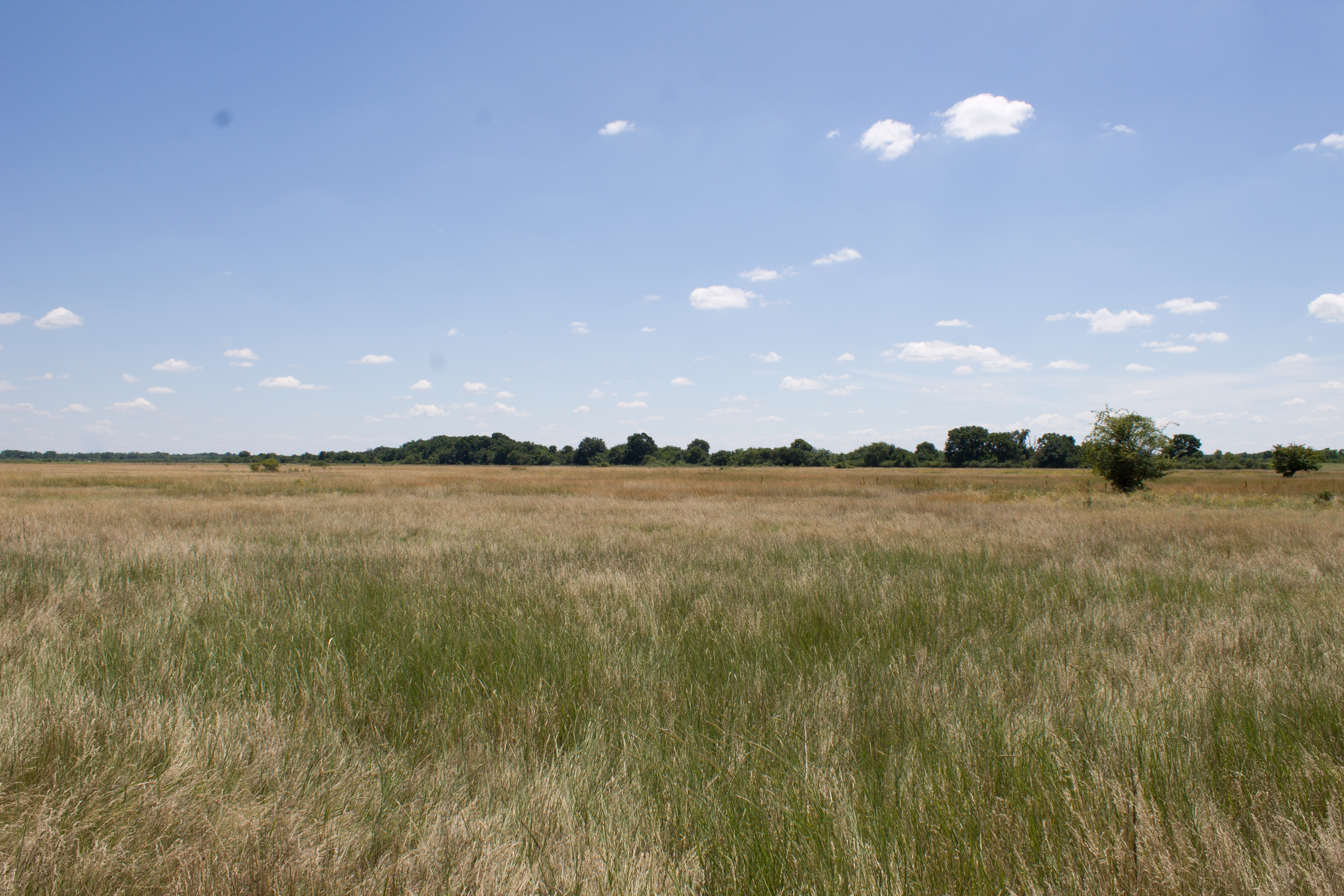 Slatinsko-stepsko stanište - Srpski Miletić